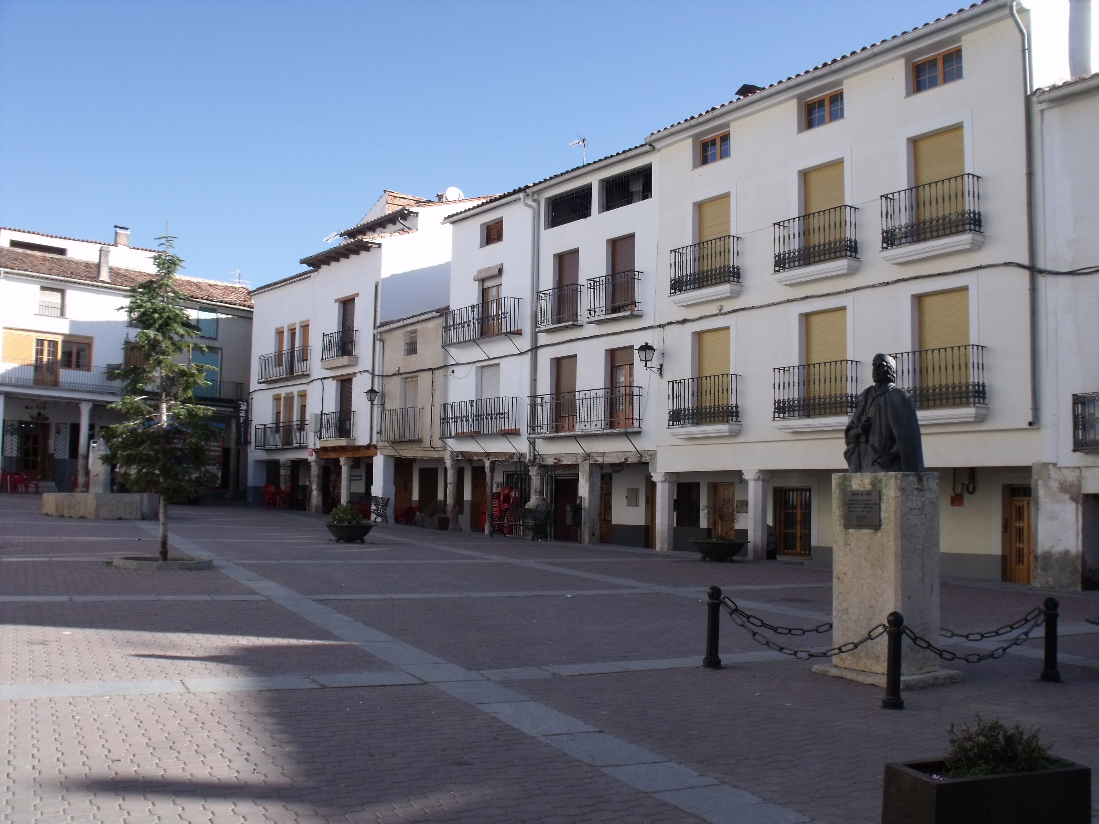 Cañete: plaza típica.